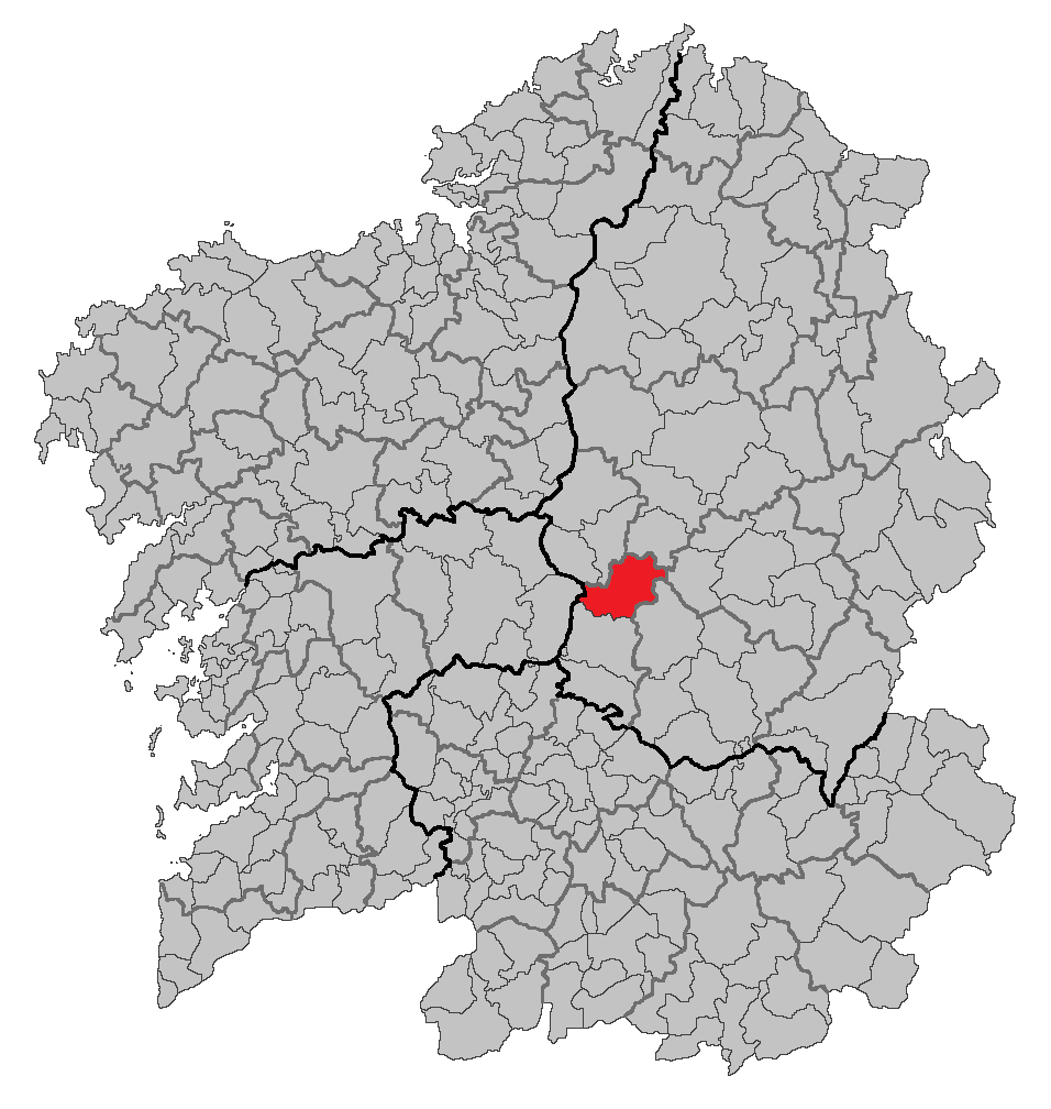 Mapa coa localización do concello de Taboada.